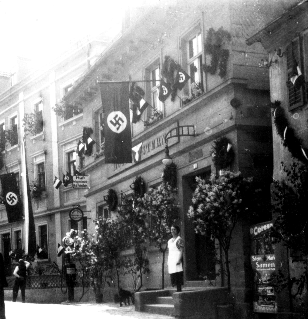 Von den Nazis zum Maifeiertag organisierter Aufmarsch durch die mit Hakenkreuzflaggen geschmückte Burgkunstadter Unterstadt am 1. Mai 1937